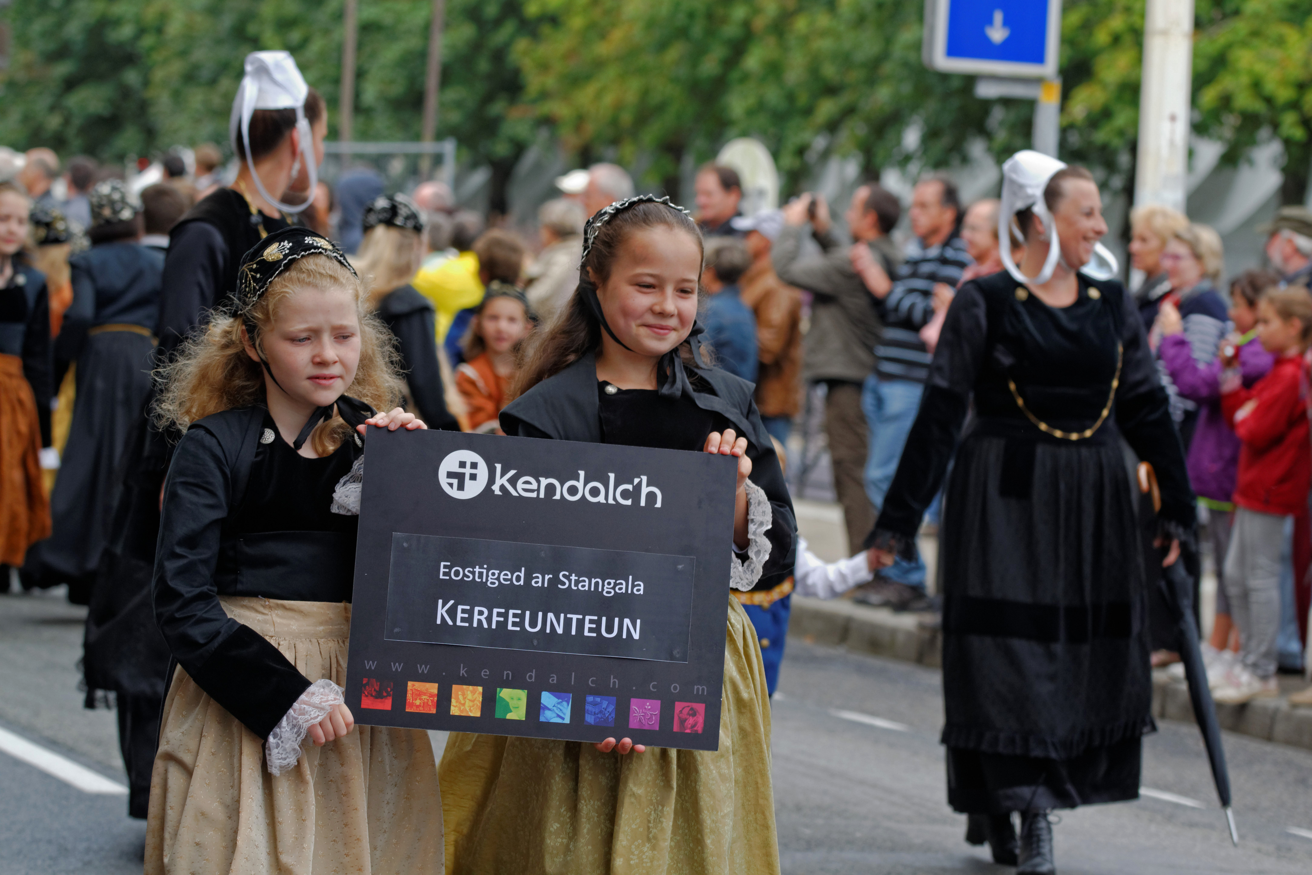 "Défilé en fête". Cercle Eostiged ar Stangala (Kerfeunteun, Quimper) lors du festival de Cornouaille 2013 le dimanche 28 juillet pour Kemper en Fête dans les rues de Quimper.